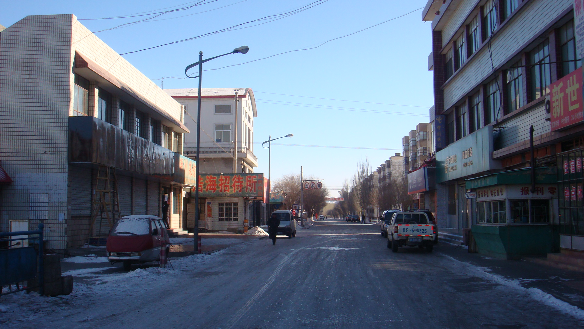 柳园火车站 Liuyuan Railway Station China Xinjiang Urumqi Welcome you to tour the, Китай Синьцзяна Урумчи приветствовать Вас на экскурсию, الصين ترحب زيارتك لاورومتشى فى شينجيانغ, 中国新疆のウルムチへの訪問を歓迎する, 中国新疆乌鲁木齐欢迎您来观光旅游